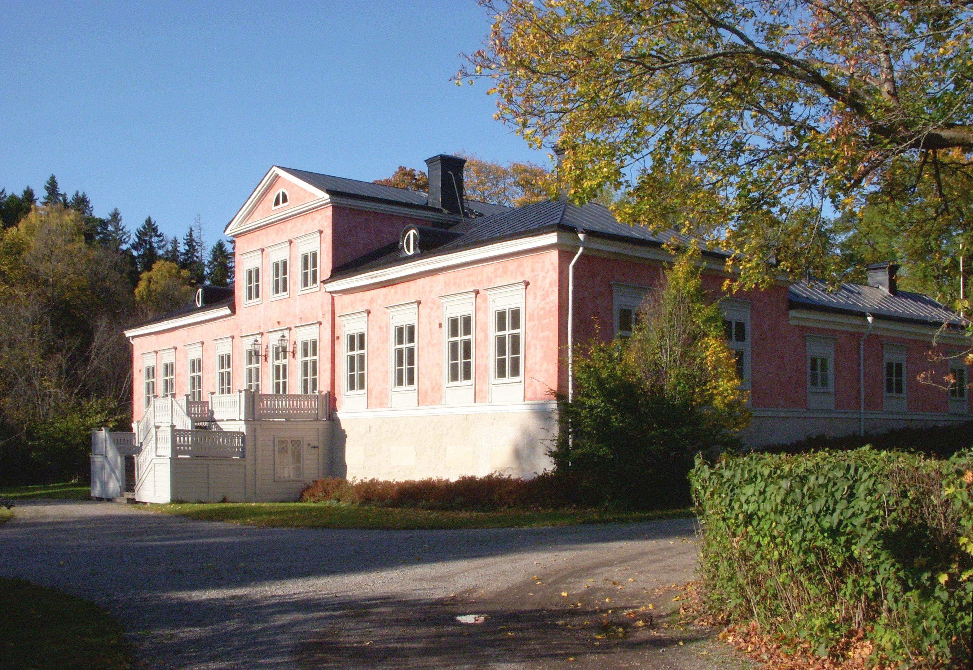 Villa Baylon, fasad mot syd